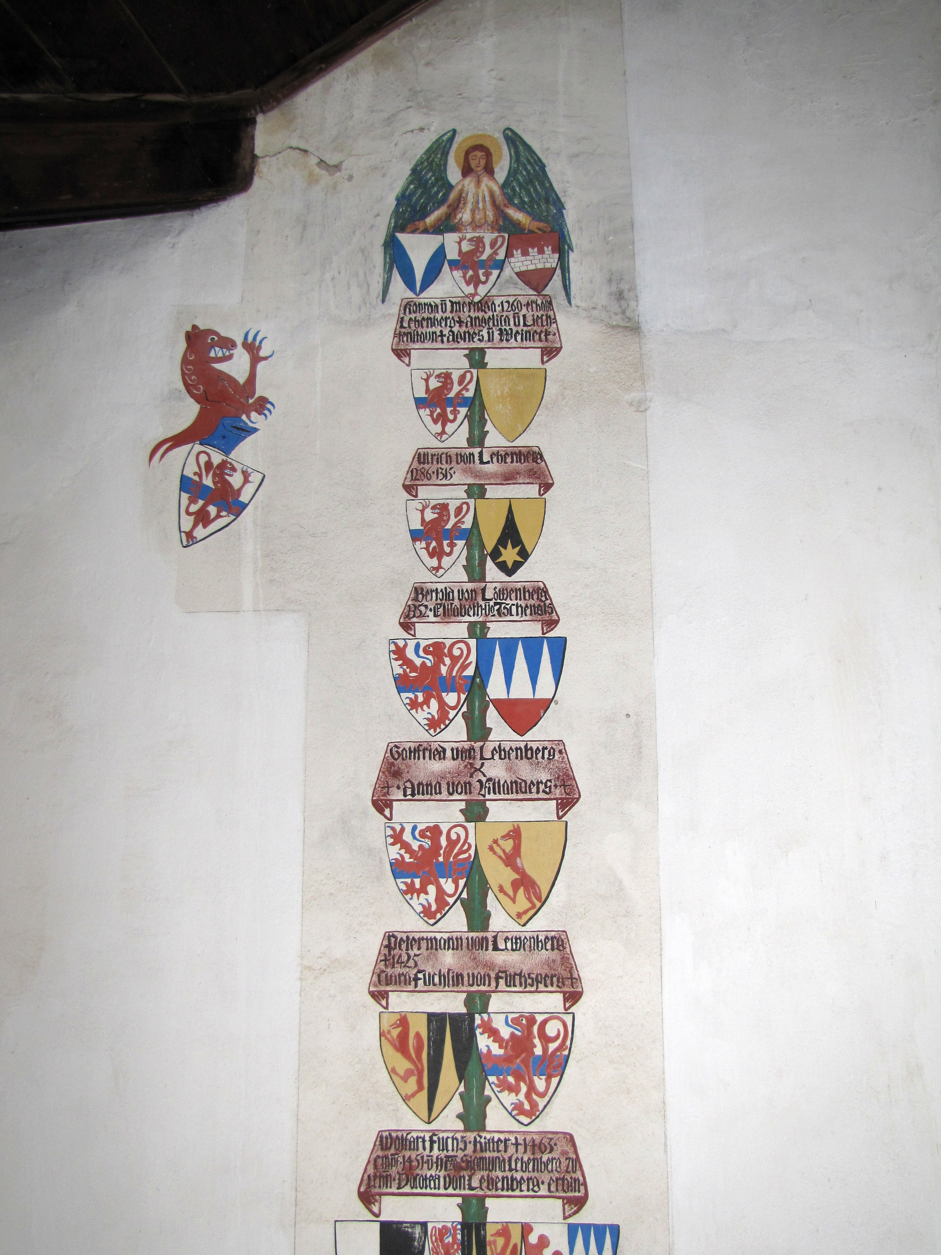 Lebenberg mit Kapelle